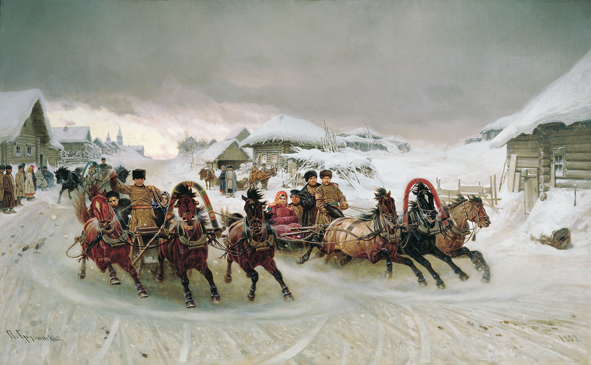 Carnival